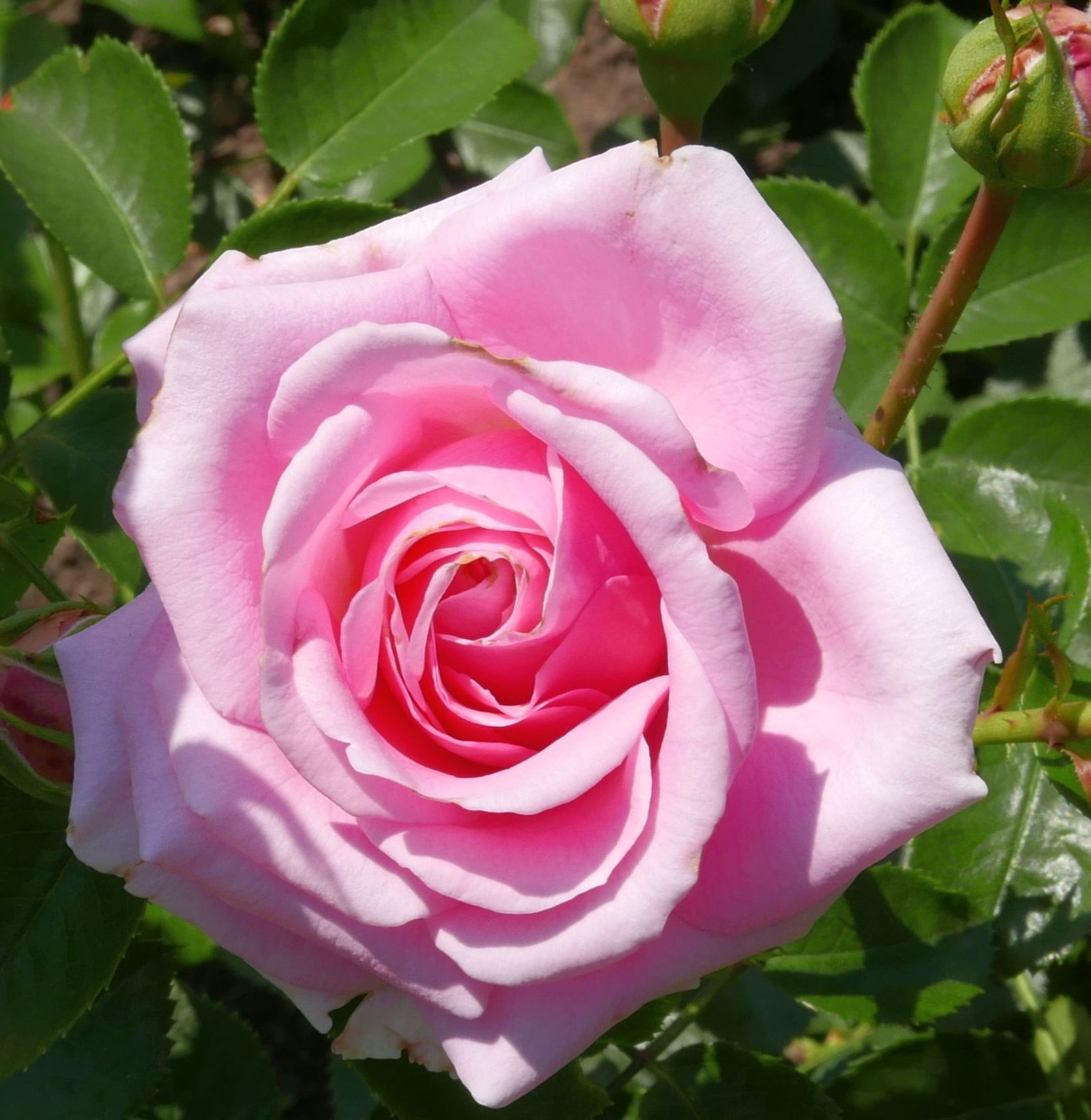 Rosarium Baden im Doblhoffpark (BD-122): Rosa 'Crescendo' Noack 2003 This media shows the natural monument in Lower Austria with the ID BD-122.